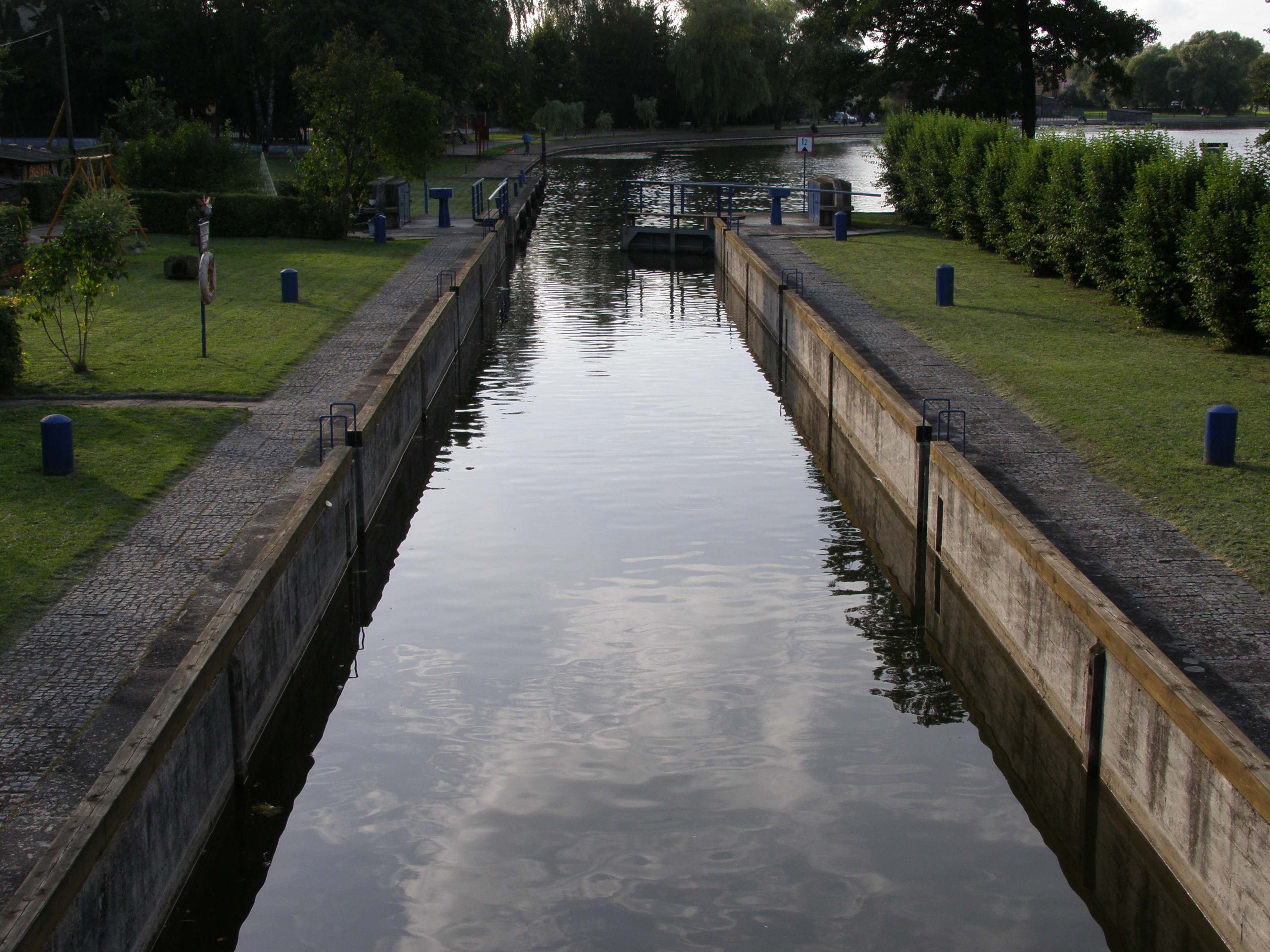 Śluza Augustów